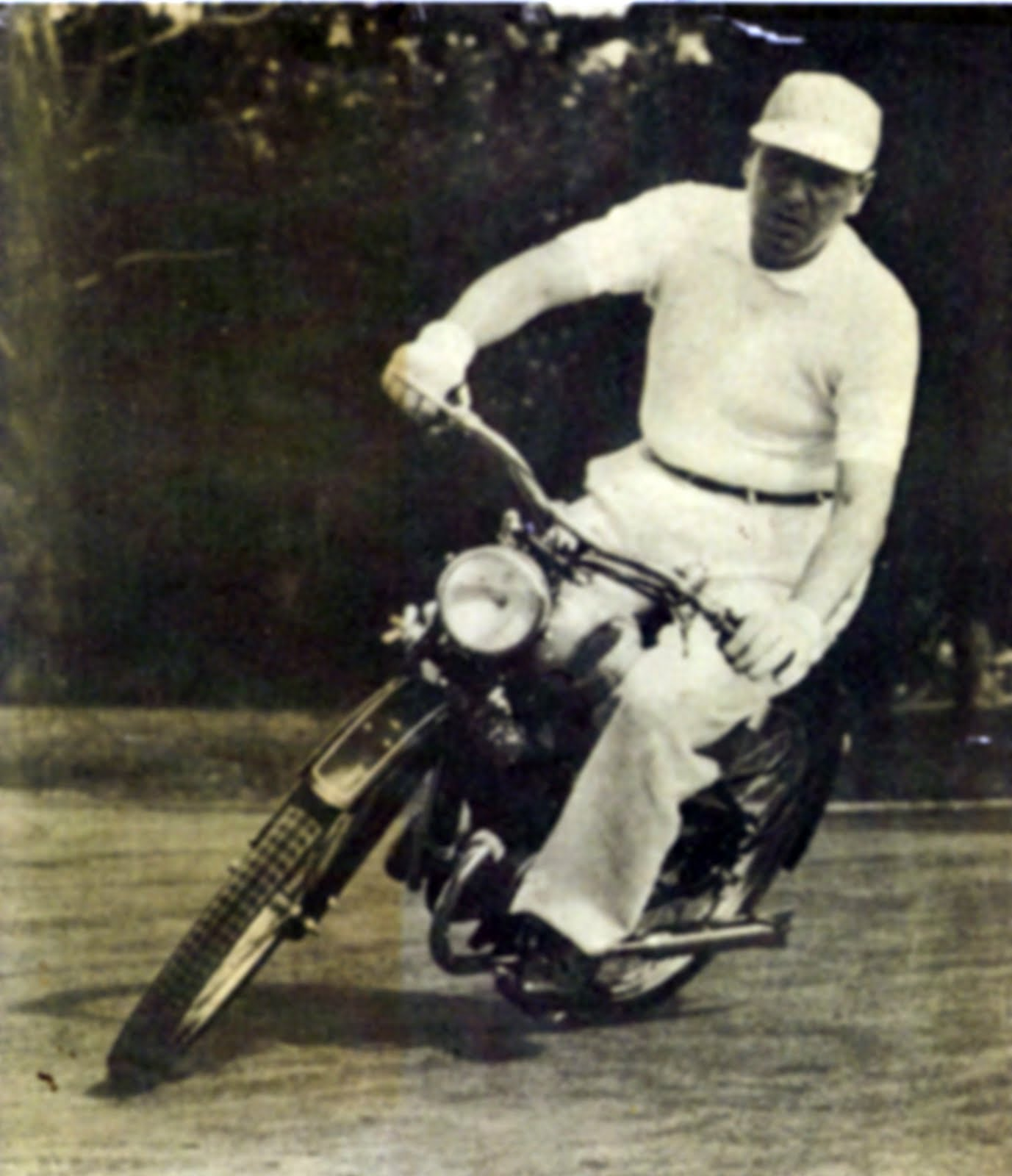 General Perón provando moto Puma Córdoba